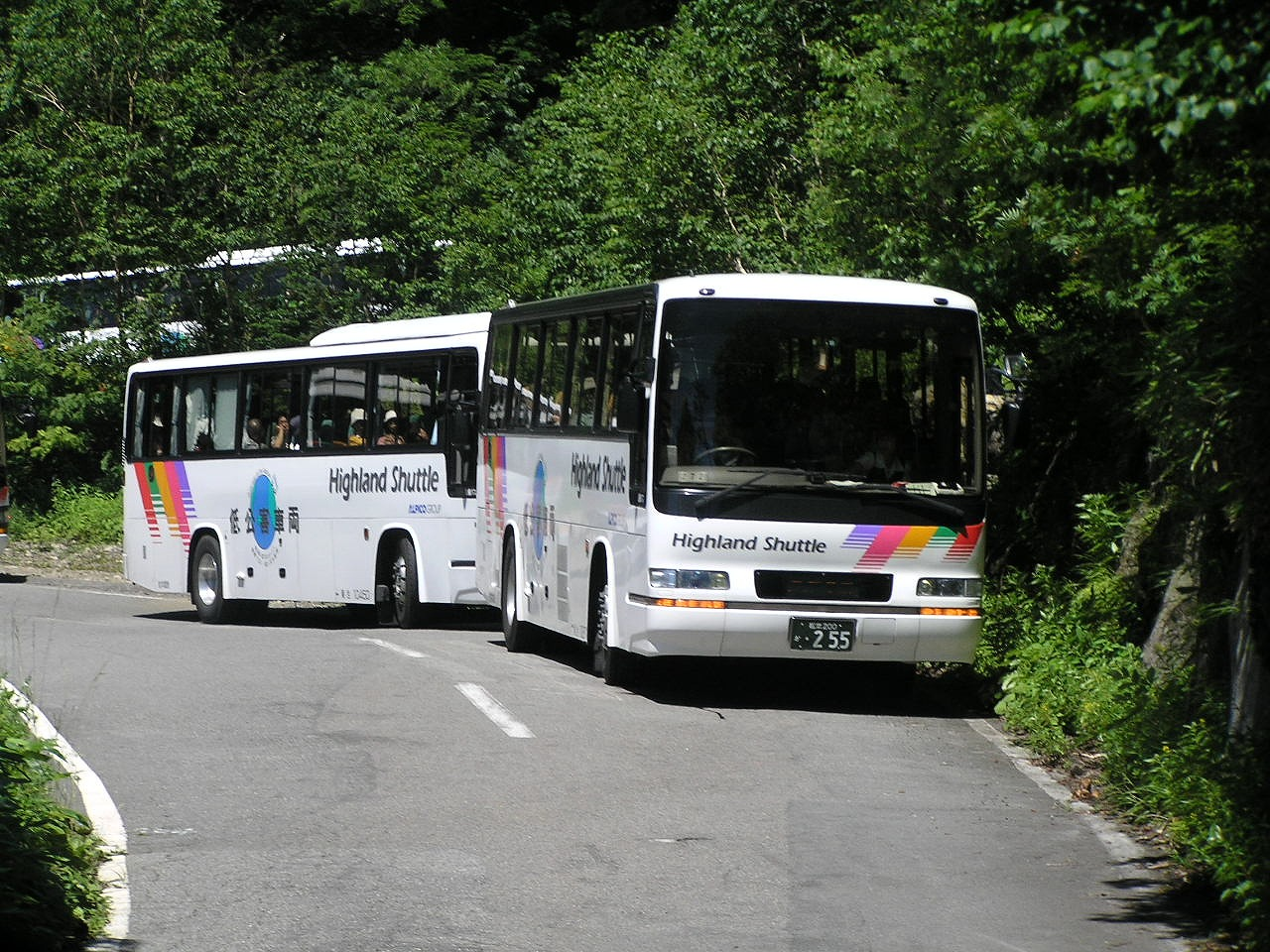 低公害シャトルバス乗鞍高原～乗鞍山頂（畳平）